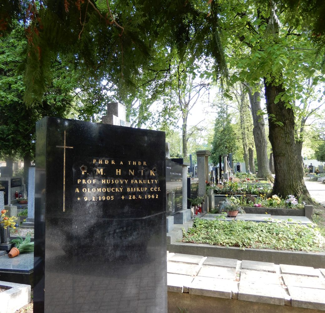 Vokovický hřbitov kaple